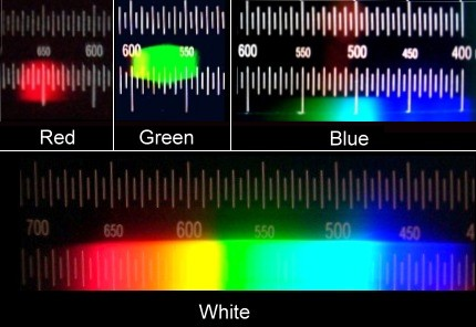 Spektren von Leuchtdioden